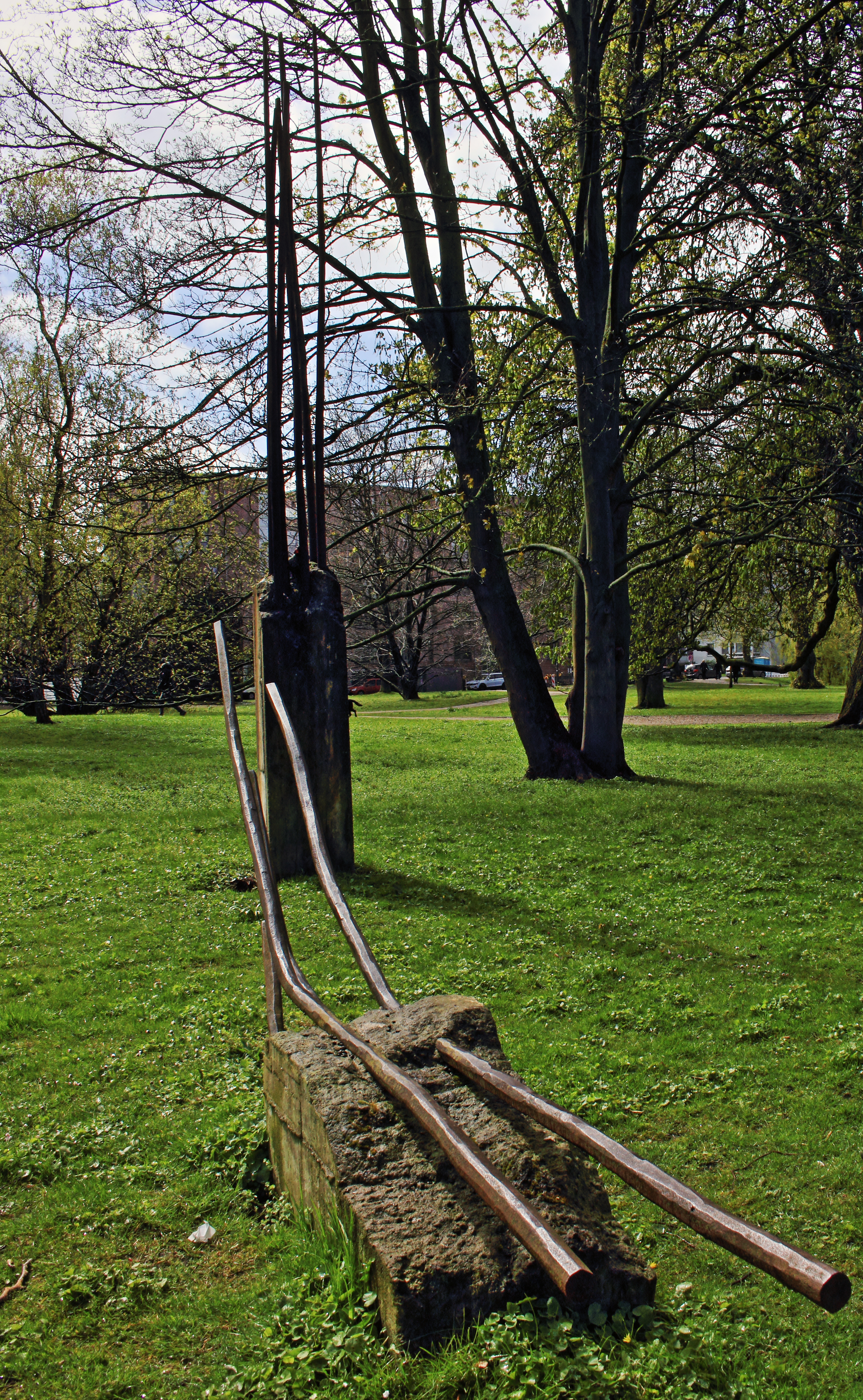 Die Skulptur "Annäherung" (1984) von Bernd-Dietrich Stolte auf der Wiese Möllingsruh im Ratsdienergarten, Kiel-Altstadt